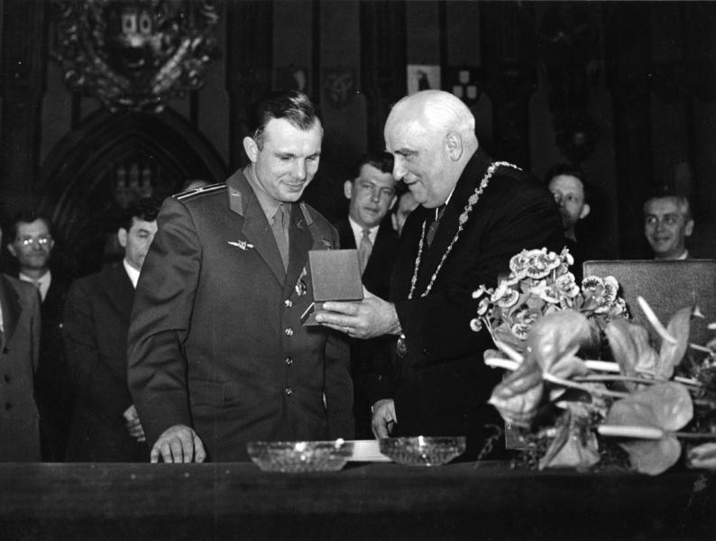 Adolf Svoboda (16. června 1900 Chvaly – 9. února 1969 Praha) byl český a československý politik Komunistické strany Československa, poúnorový poslanec Národního shromáždění ČSR a primátor hlavního města Prahy.